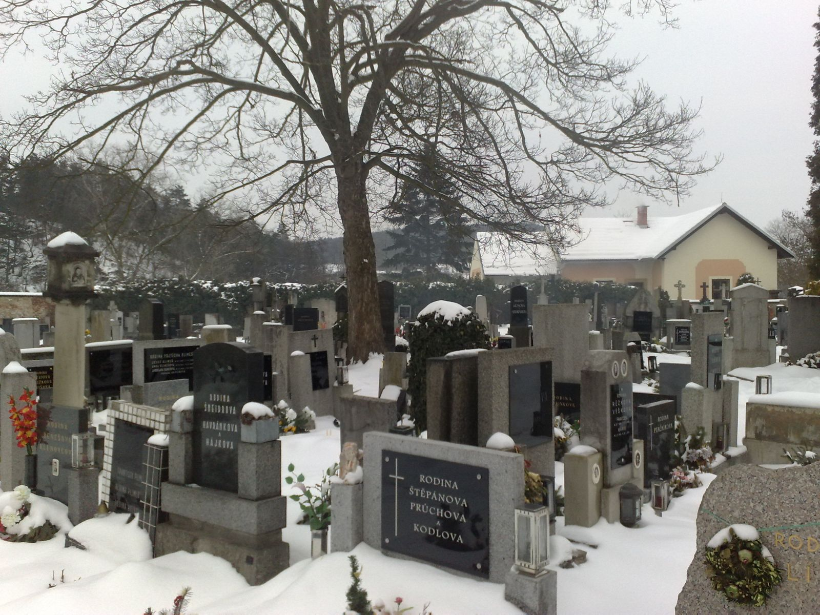 Hřbitov u kostela svatého Jiří v Plzni